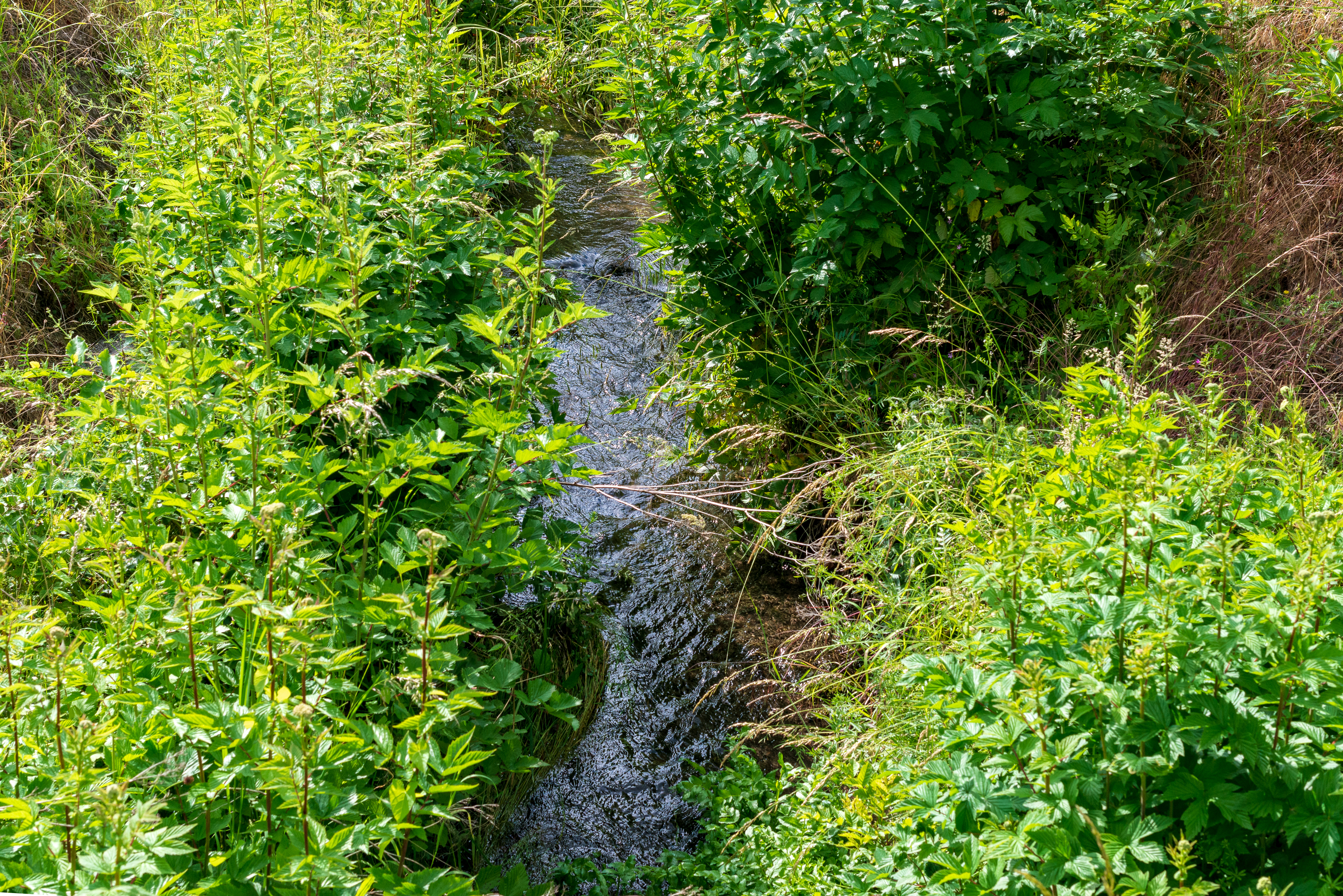 D'Bouneschbaach bei der Rue Andethana zu Ueweraanwen.